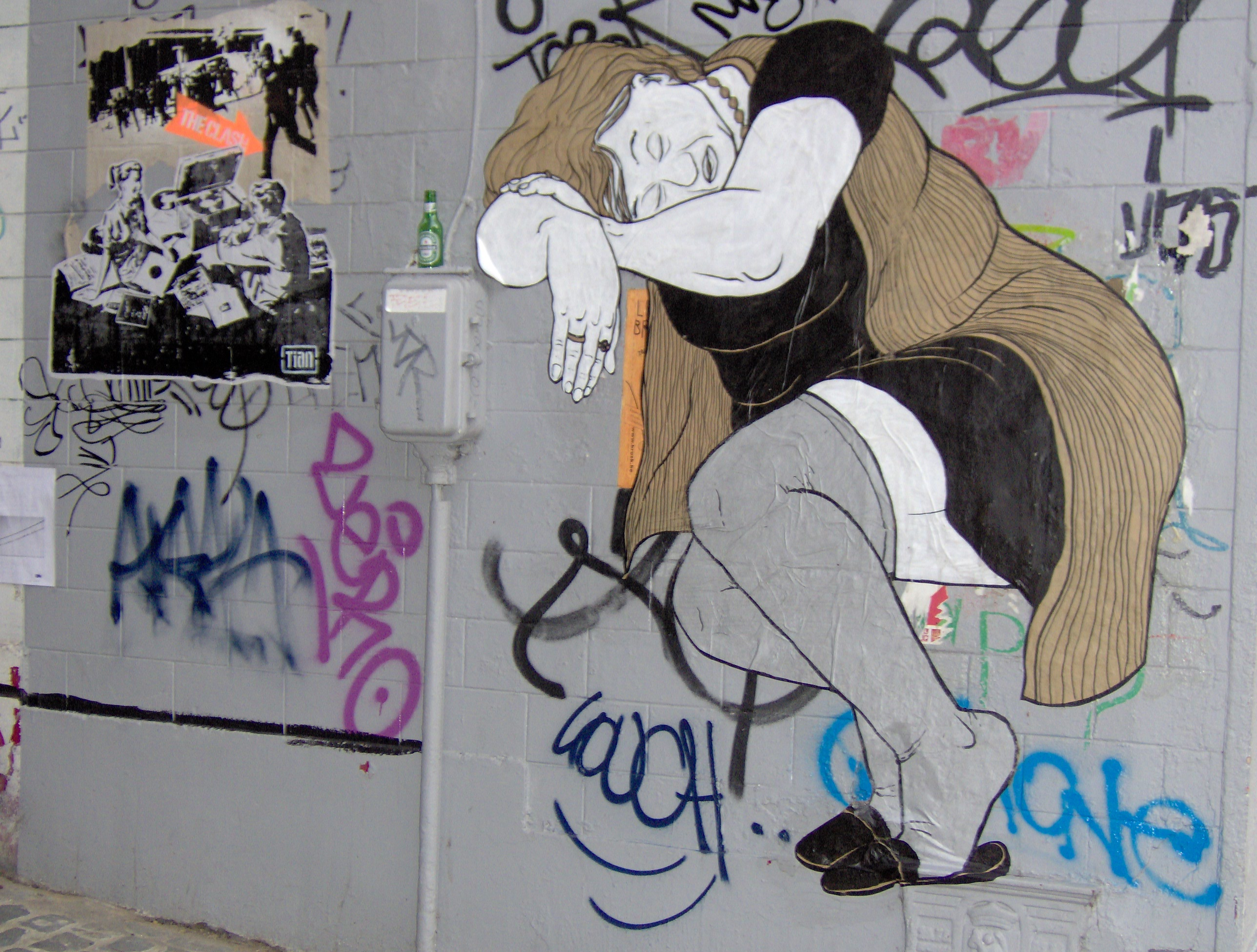 marolles3